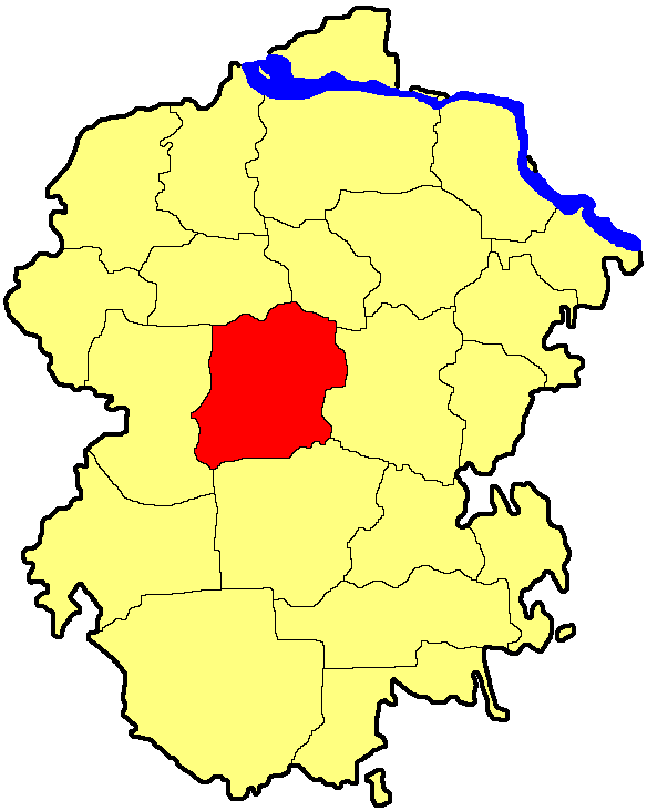 Вурнаринський район Чувашії